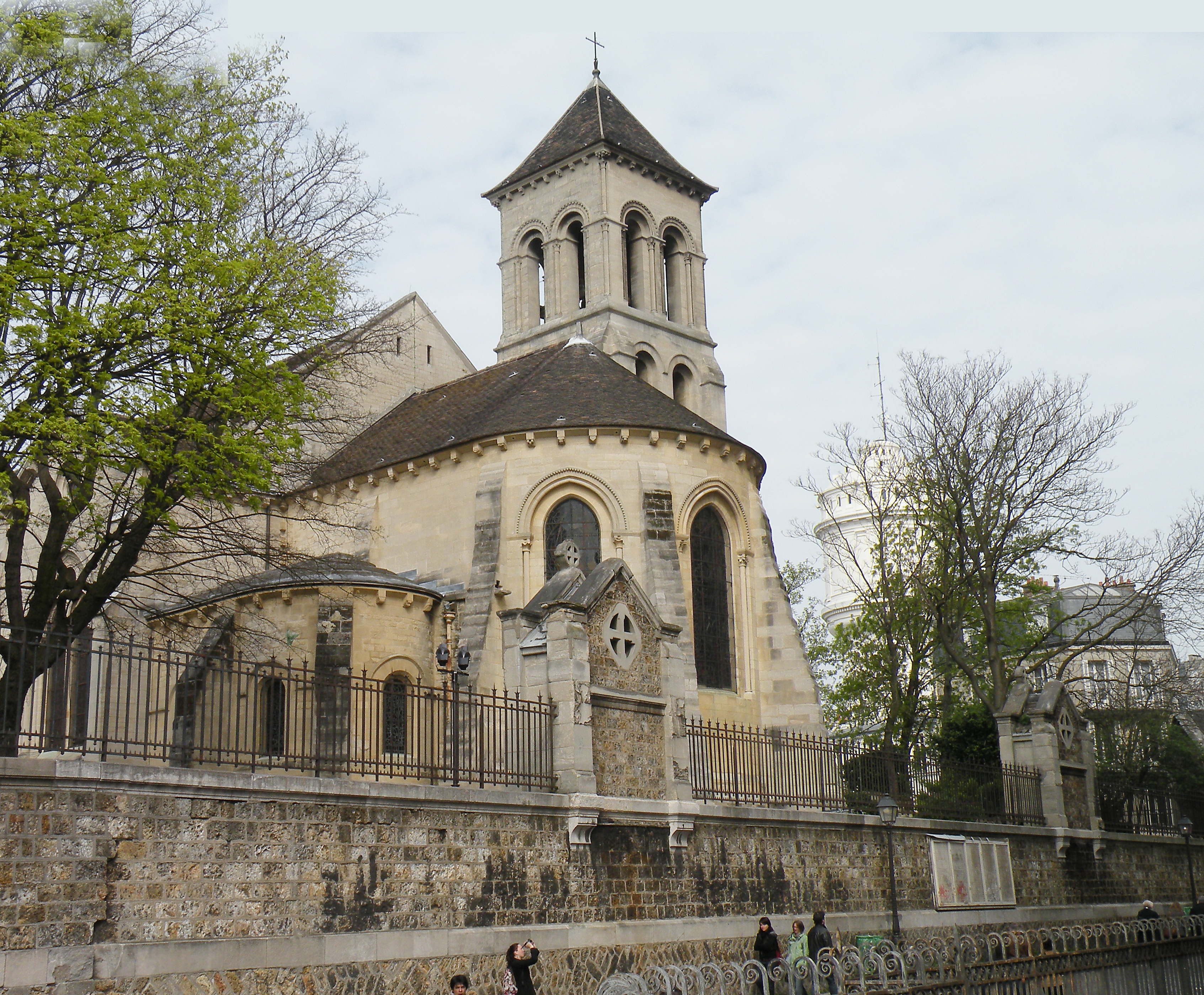 Церковь Св.Петра на Монмартре